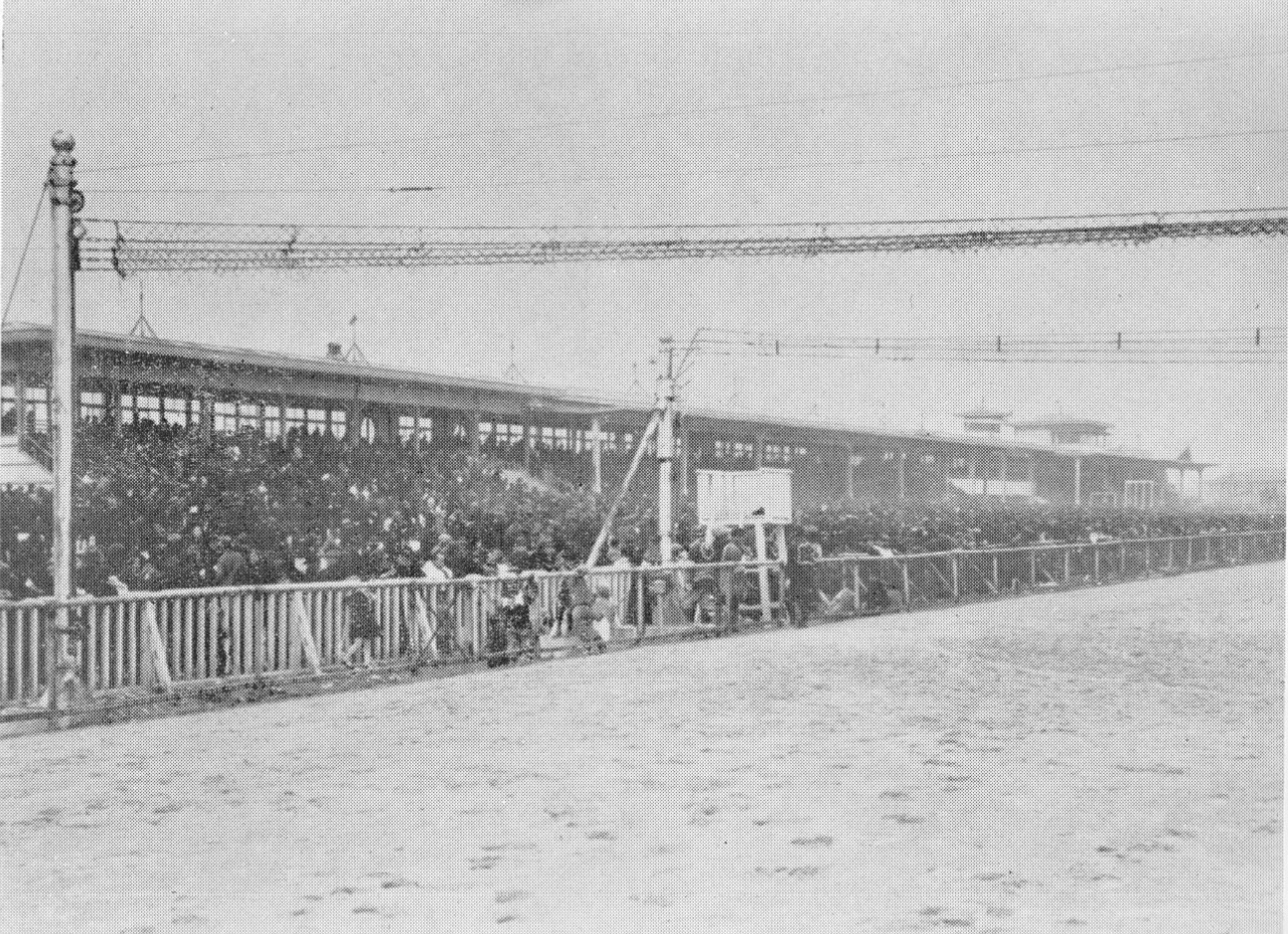 京都競馬場の発馬機（京都競馬倶楽部時代 年代は1923年(大正12年) から1937年(昭和12年)の間）